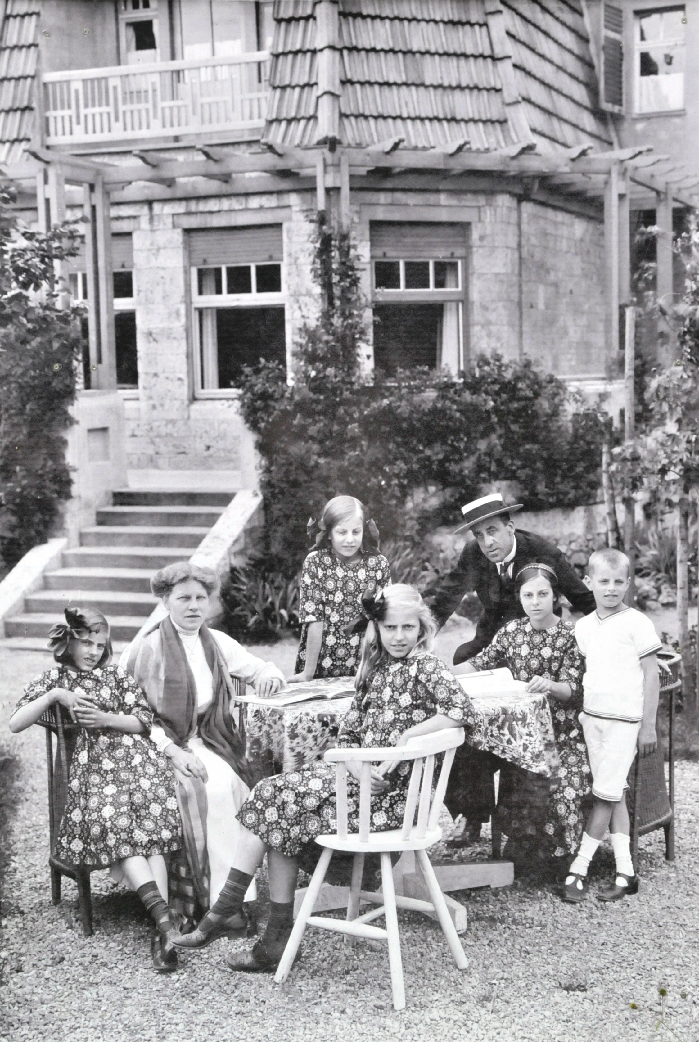 Henry van de Velde mit Familie vor seinem Haus Hohe Pappeln in Weimar; von links: Puppie, Nele, Mutter Maria, Anne-Sophie, Vater Henry, Thylla, Thyl